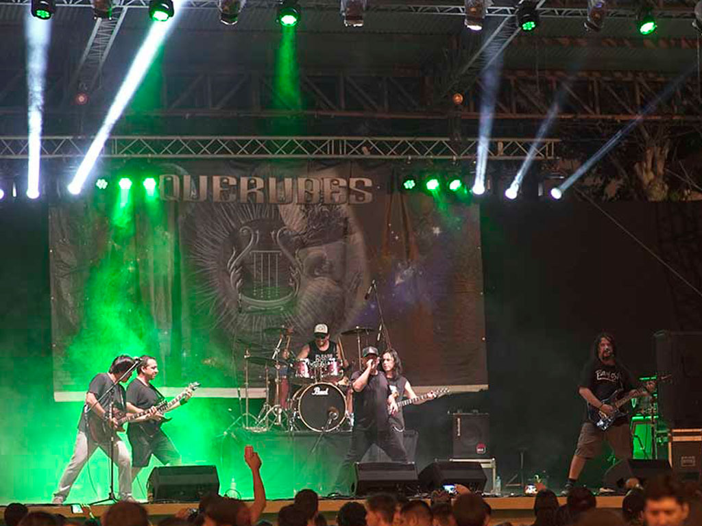 Querubes en vivo en el Ñambopu Rock Festival, realizado el 10 de febrero de 2019.